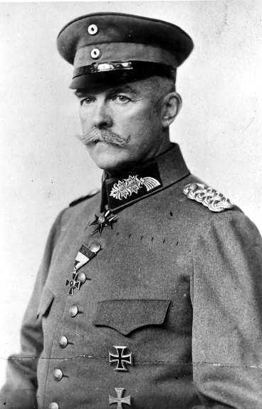 Oskar Theodor Haevernick, Generalleutnant mit Verwundetenabzeichen, Eisernen Kreuz, Lübecker Hanseatenkreuz, s/w